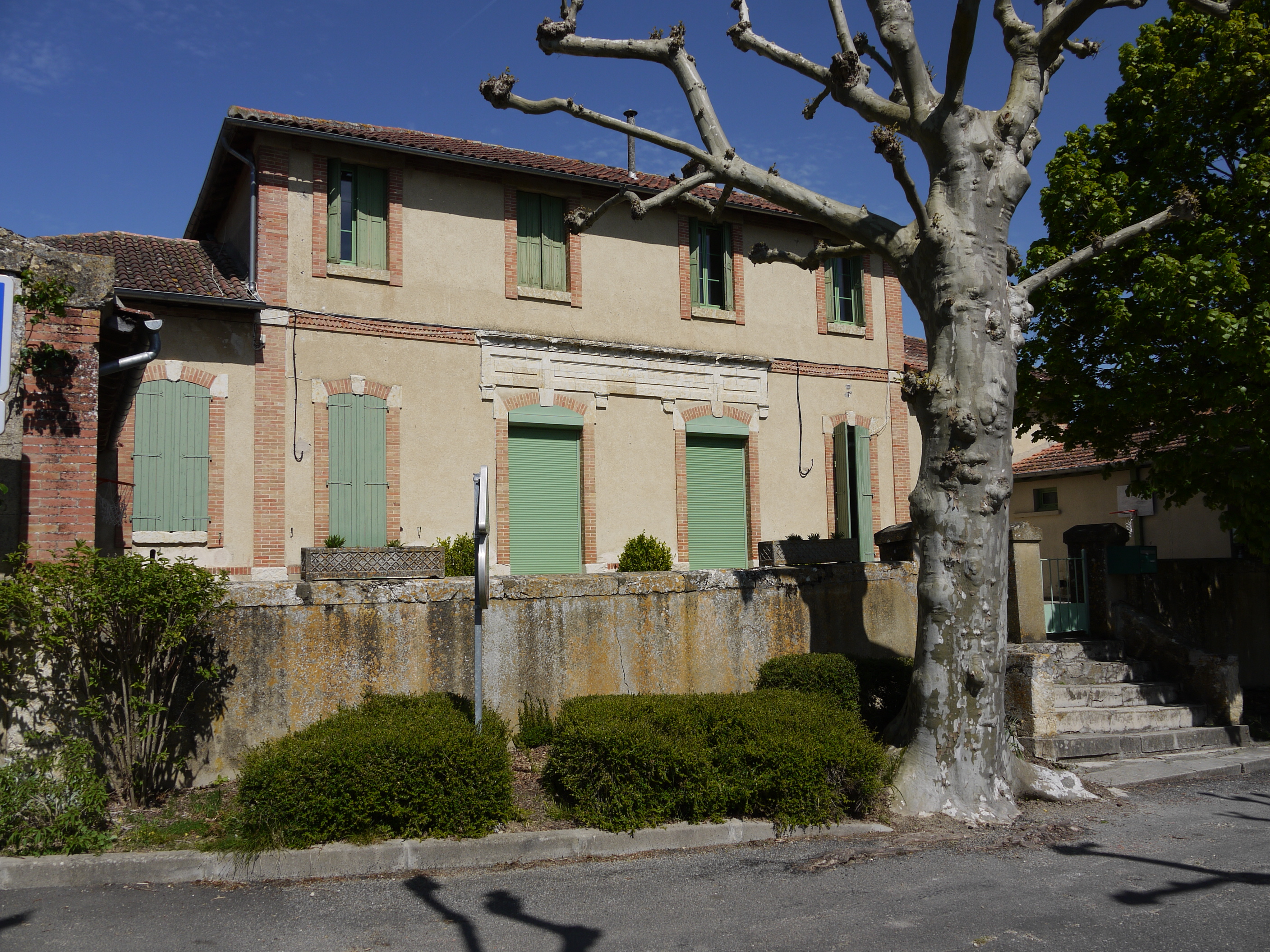 L'ancienne école à Lahitte (Gers, France).